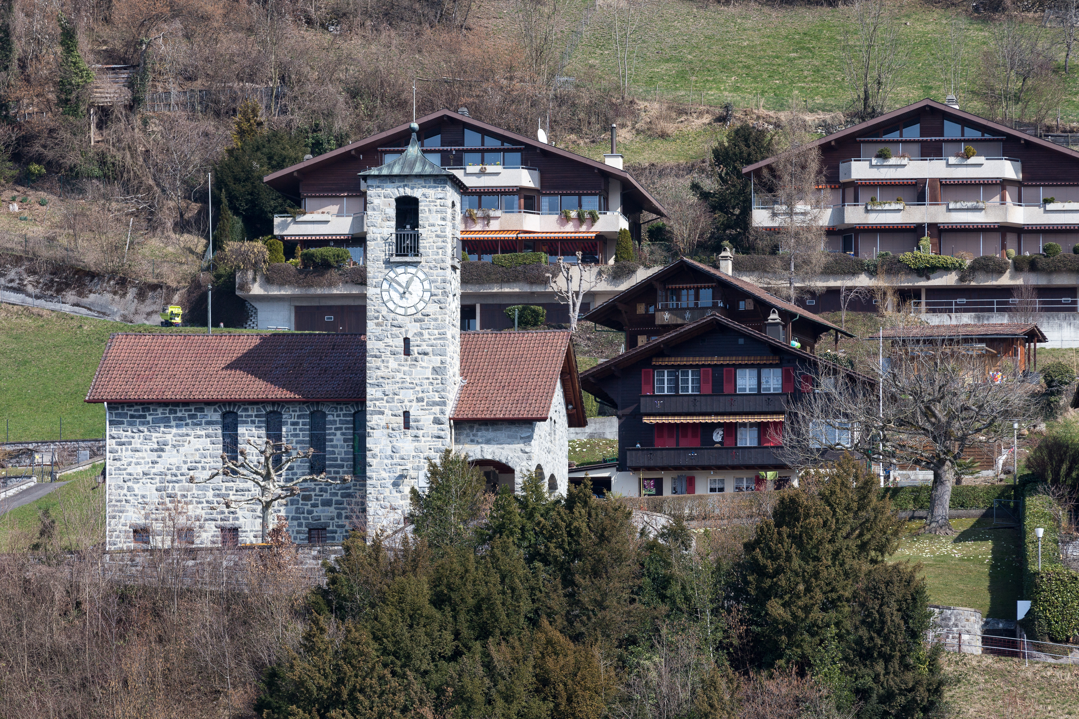 Kirche Merligen, Gemeinde Sigriswil BE, erbaut 1936/37.